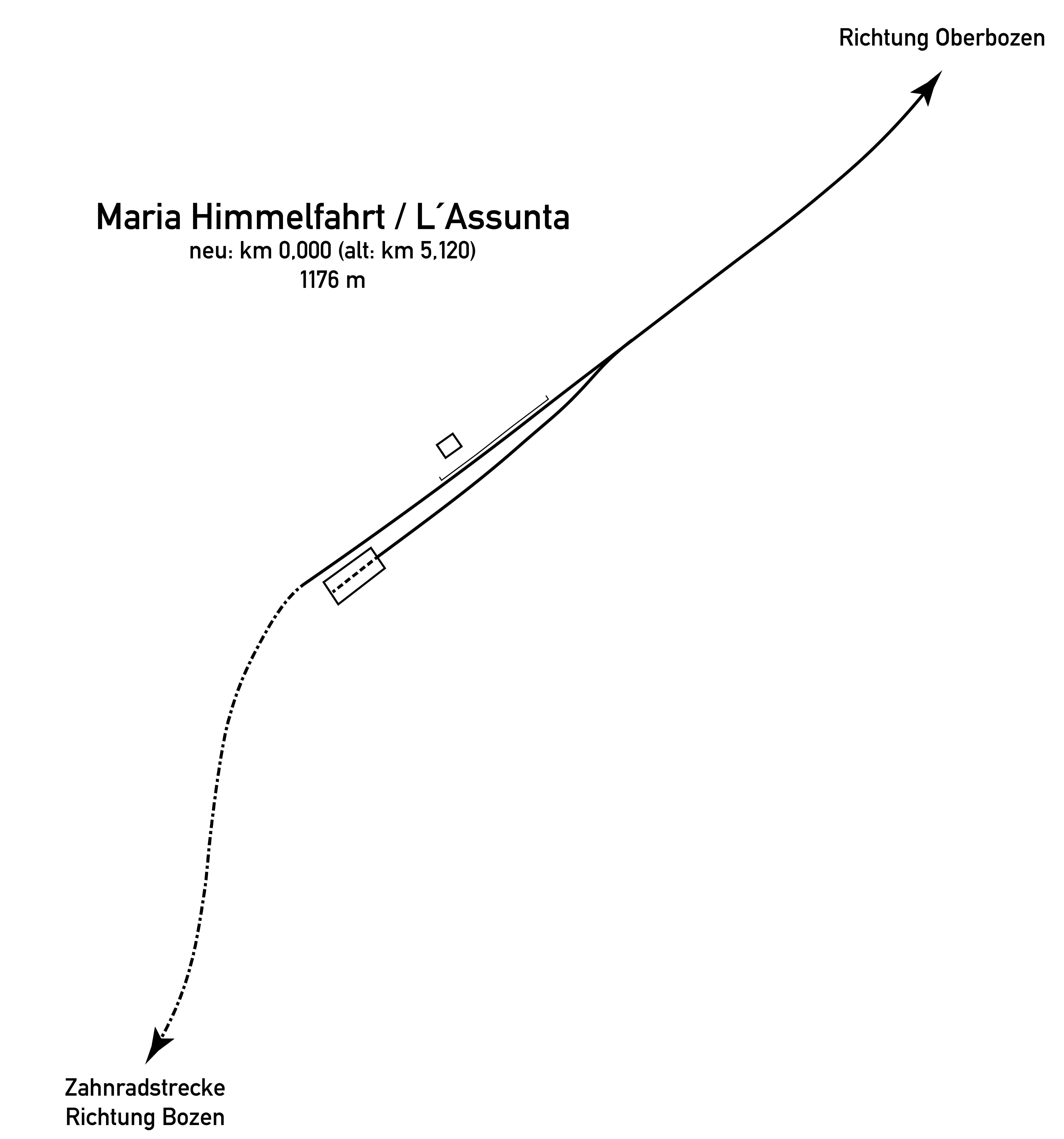 Gleisplan der Haltestelle Maria Himmelfahrt / L´Assunta der Rittner Bahn